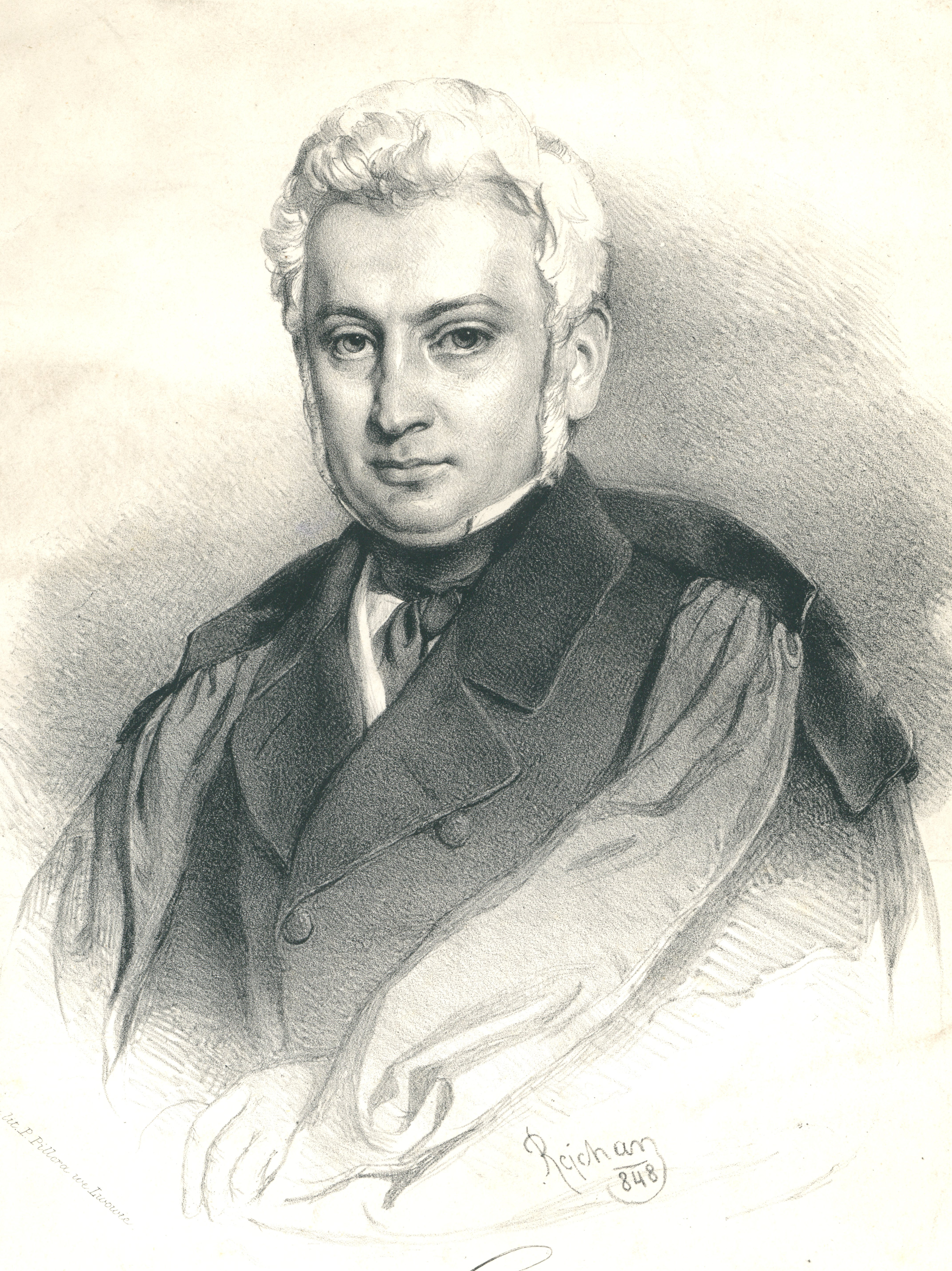 Franciszek Stroński